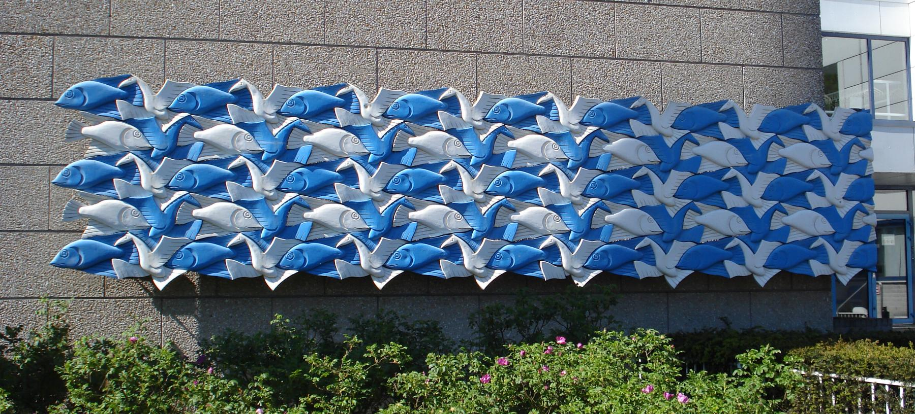 Waterzuiveringsbedrijf Den Haag, Houtrustweg. Relief after M.C. Escher. Den Haag/The Netherlands.